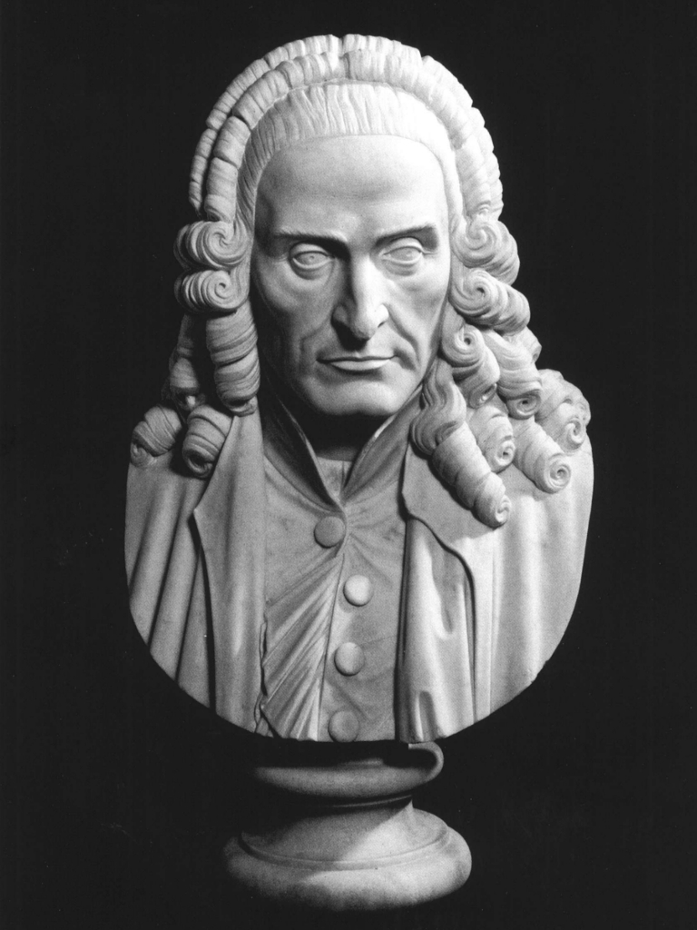 Busto di Bernardino Zendrini, opera di Gaetano Zennaro precedente al 1847. Il busto fa parte del Panteon Veneto, conservato presso Palazzo Loredan di Campo Santo Stefano a Venezia.